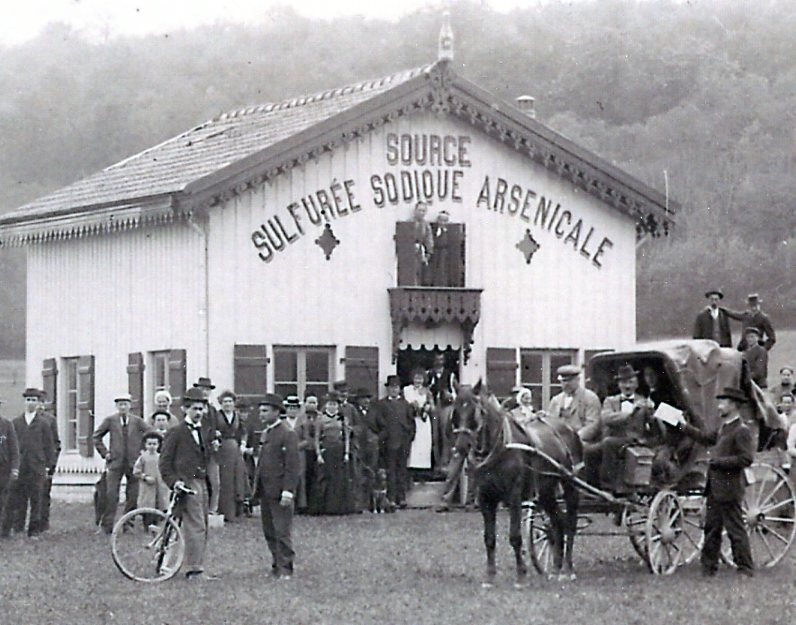 groupe de citoyens devant le chalet de la source de Dolaincourt